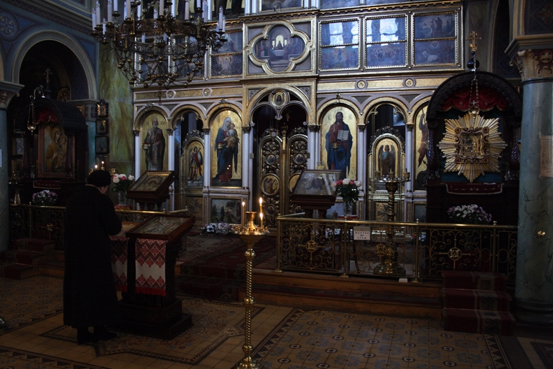 Львовская Свято-Георгиевская церковь внутри